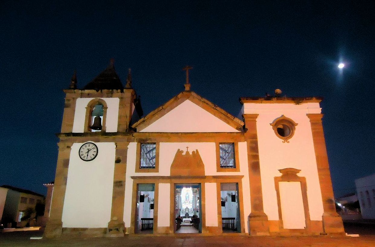 Igreja Matriz de Nossa Senhora das Vitórias. Catedral da Diocese de Oeiras. Oeiras/PI